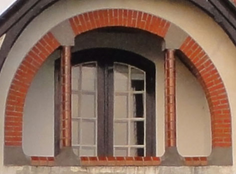 Woonhuis Hoofdstraat 33 in Leens (detail)